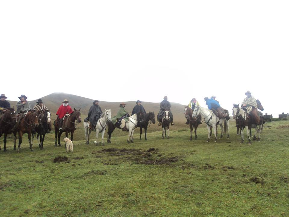 Chagra el caballero de los Andes, listo para el rodeo.